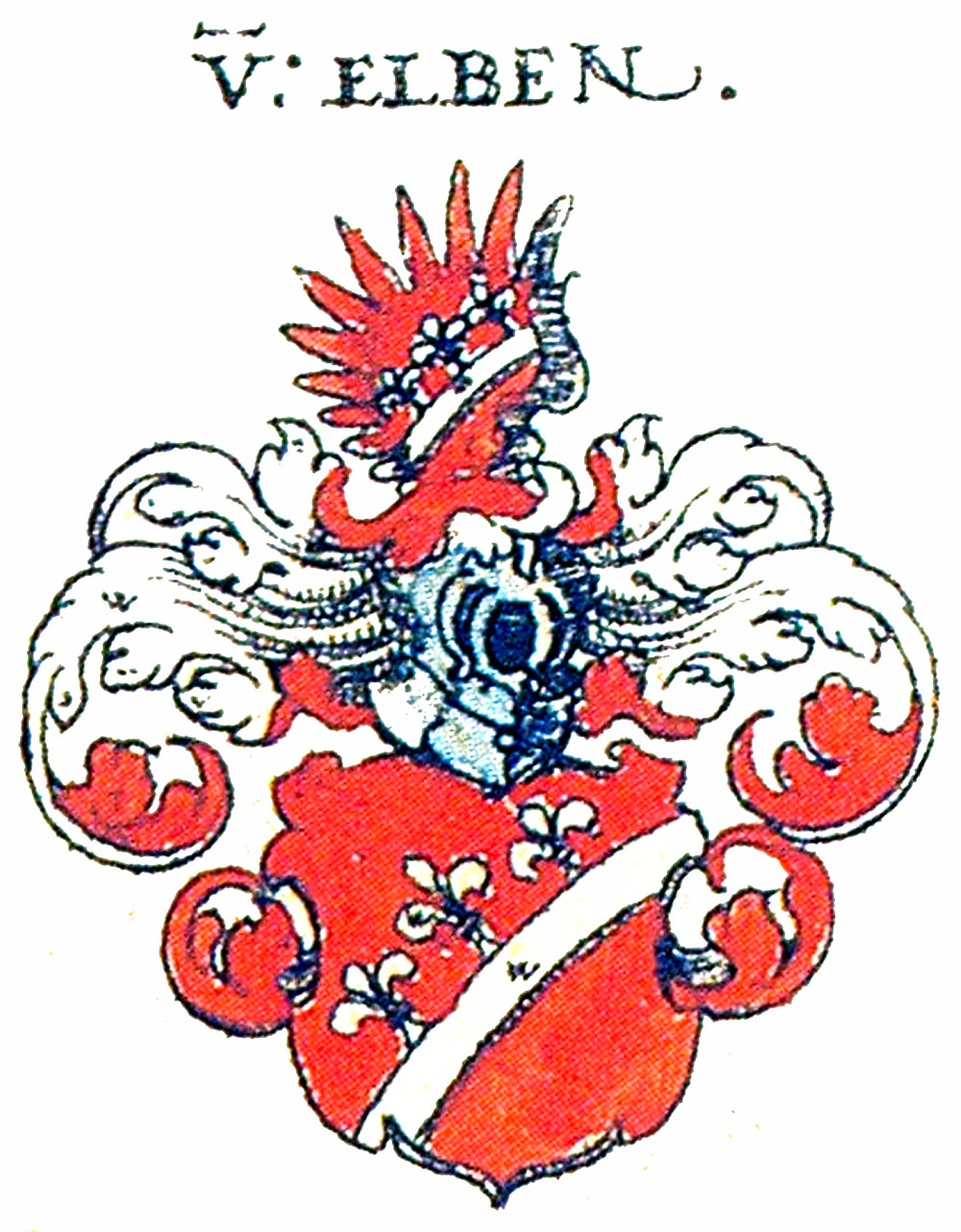 Wappen der Hessischen Adelsfamilie Elben